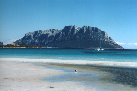 Tavolara, vor Sardinien